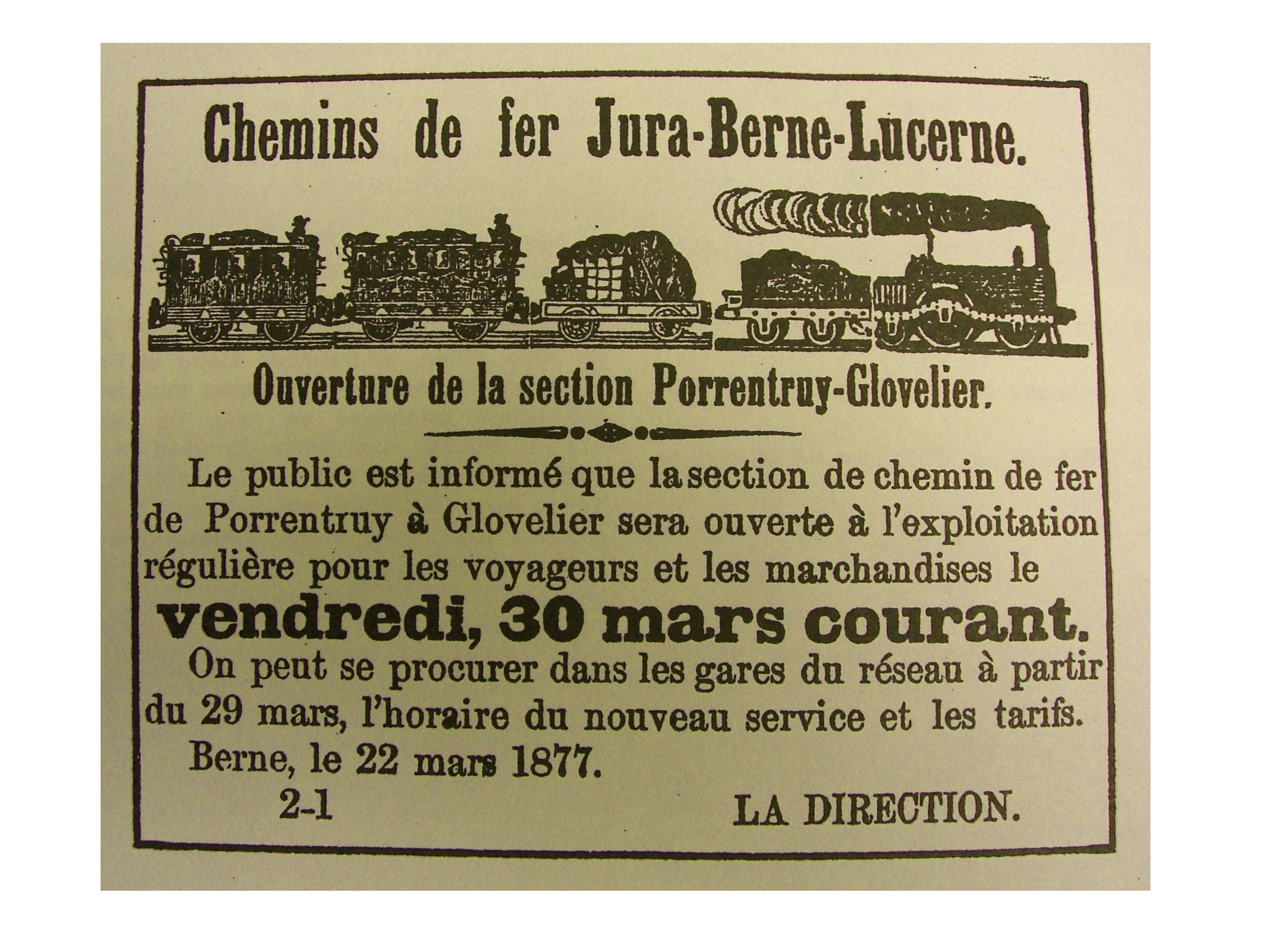 Hinweis zur Eröffung des Teilstückes Porrentry-Glovelier der Jura-Bern-Luzern Bahn am 30. März 1877.